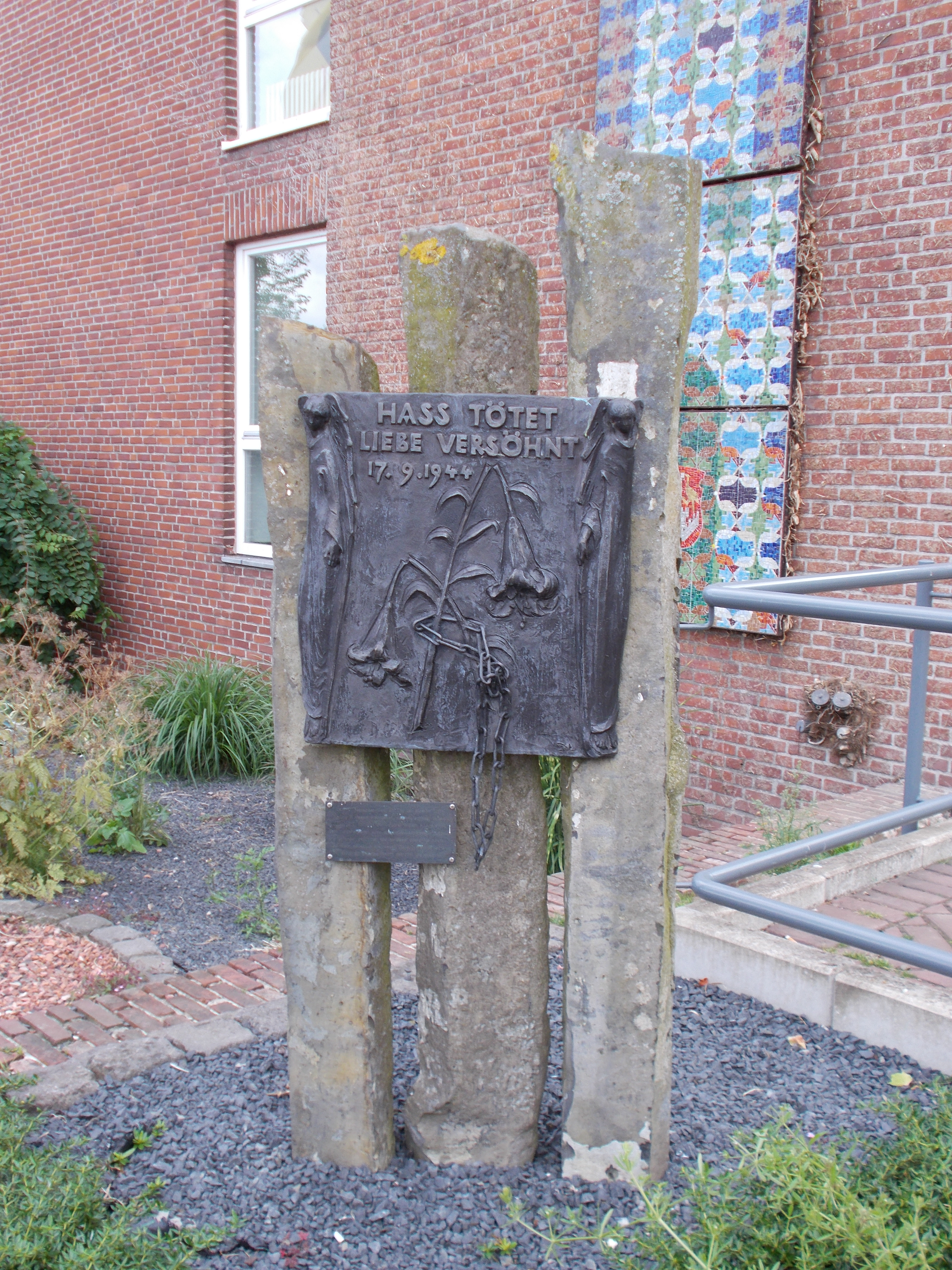 Das Denkmal vor dem Kraneburger Rathaus erinnert an die Luft-Landung der Alliierten am 17. September 1944